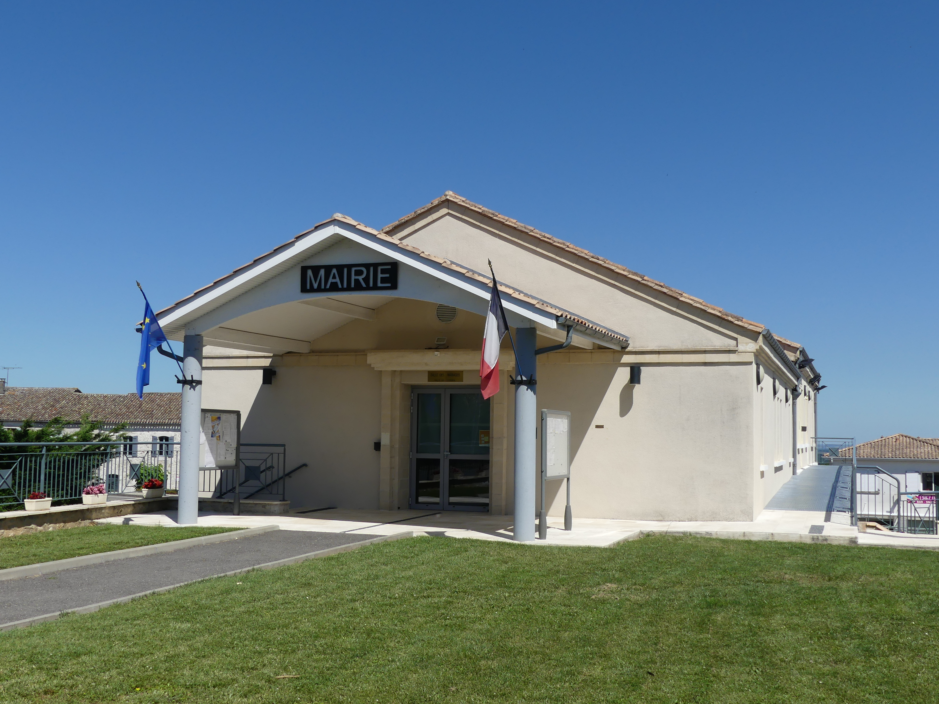 La mairie de Castelnaud-de-Gratecambe, Lot-et-Garonne, France.